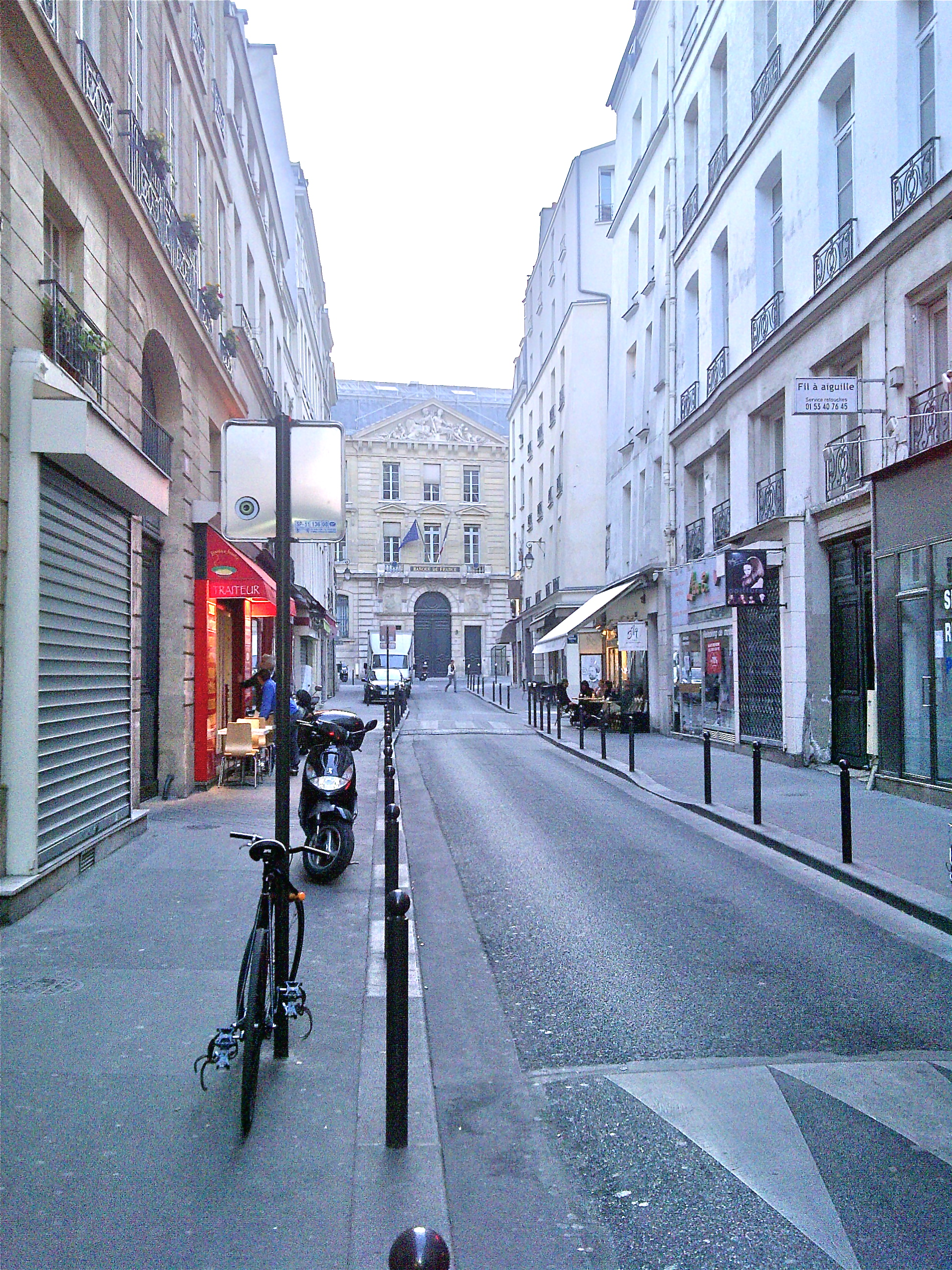 a view of Rue Coquillière Paris in spring 2011